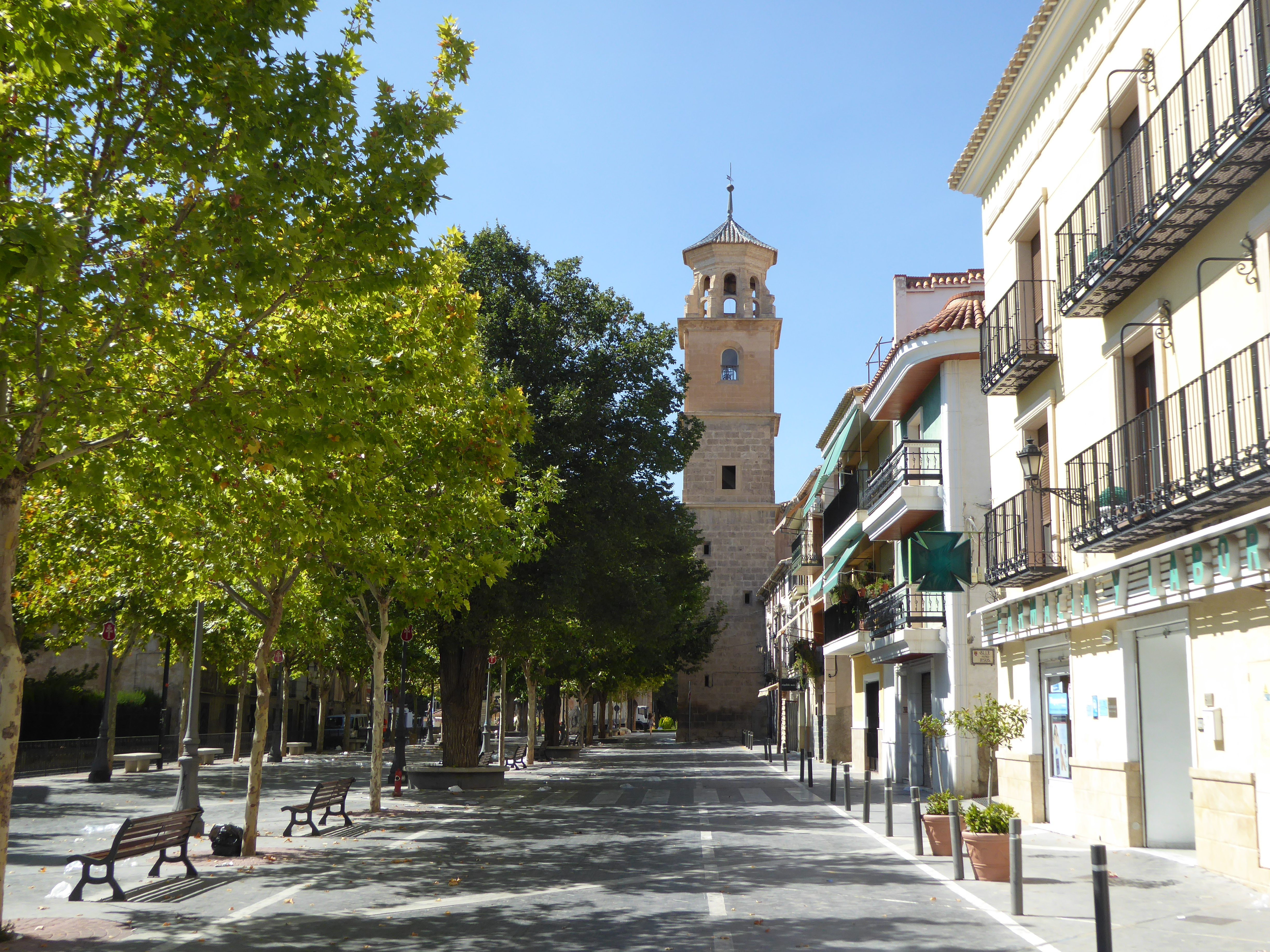 Iglesia Parroquial de la Purísima Concepción